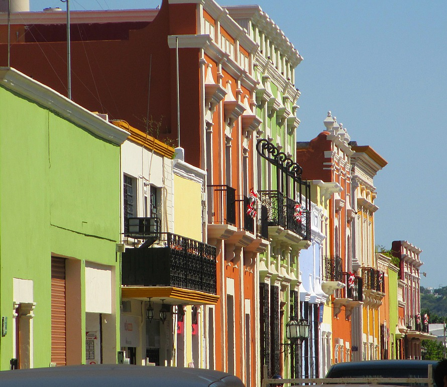 Arquitectura colonial en Campeche.